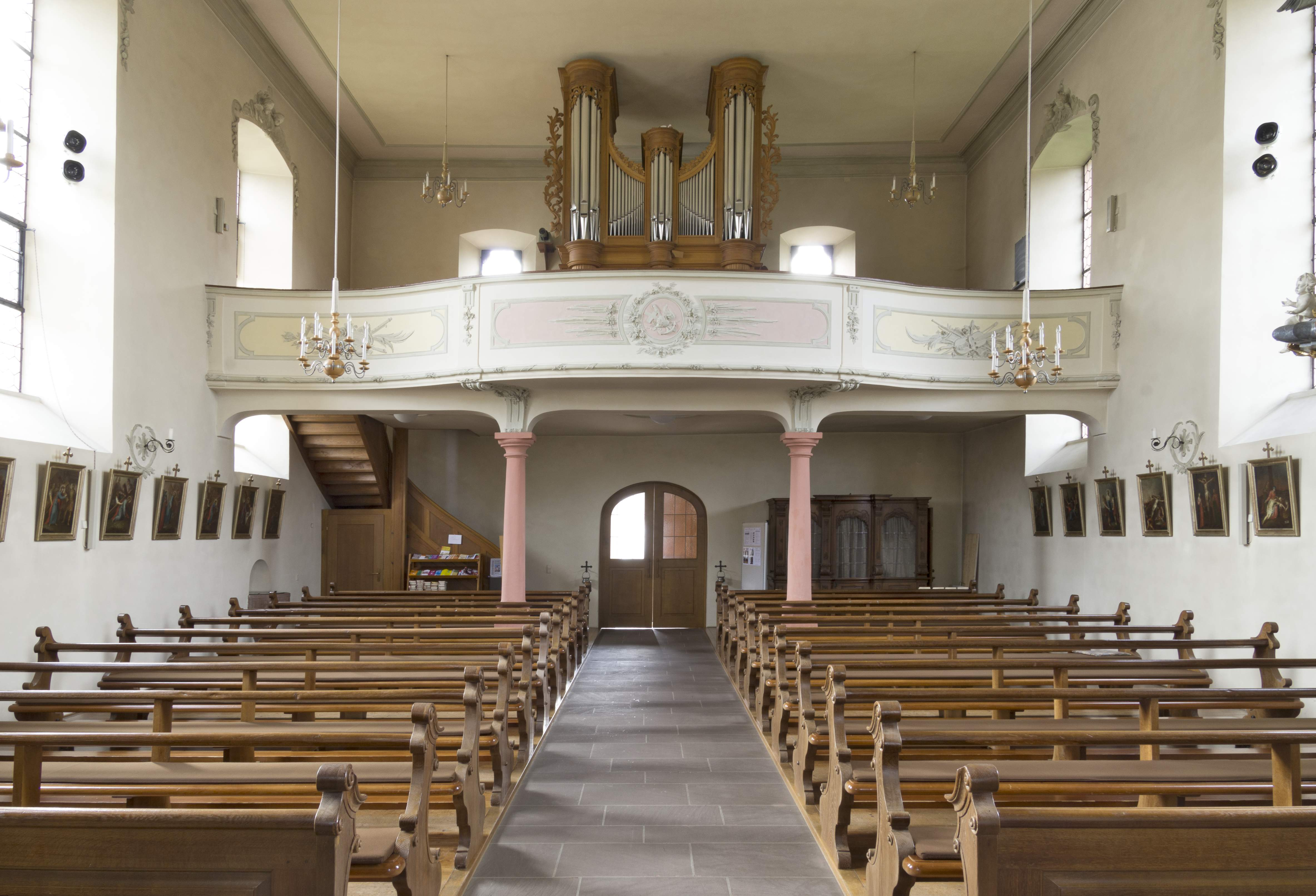 Die Katholische Pfarrkirche in March Holzhausen